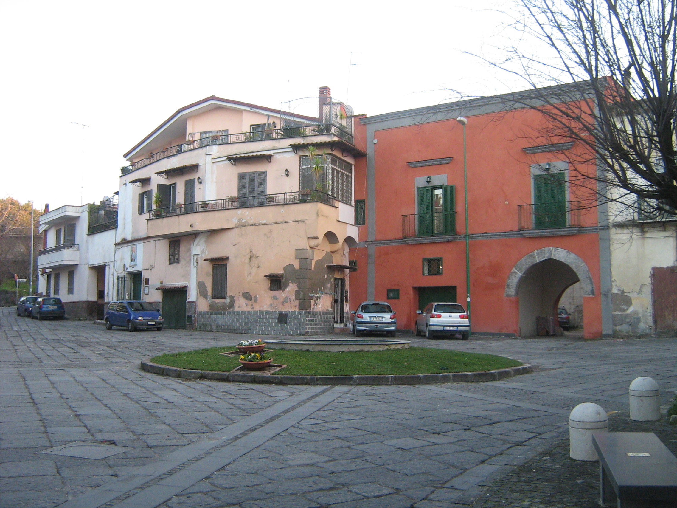 Autore Lusb 11-Gennaio-2009